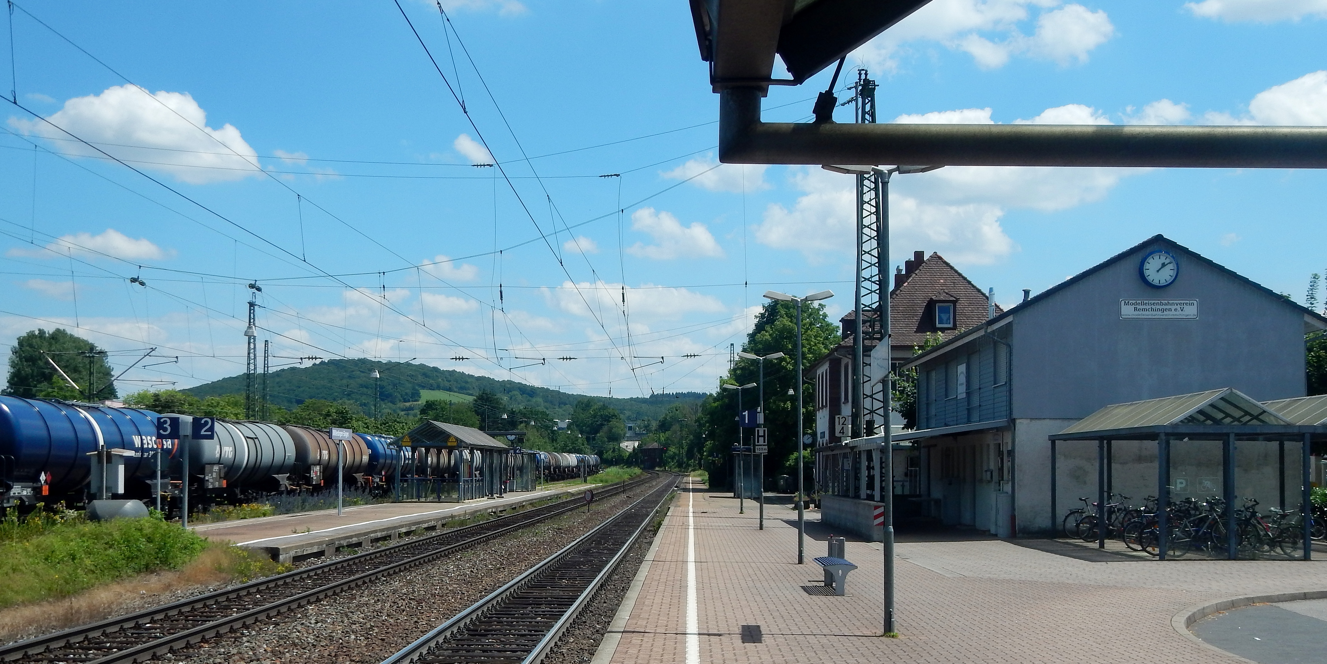 Bahnhof Wilferdingen mit Modelleisenbahnverein MEVR